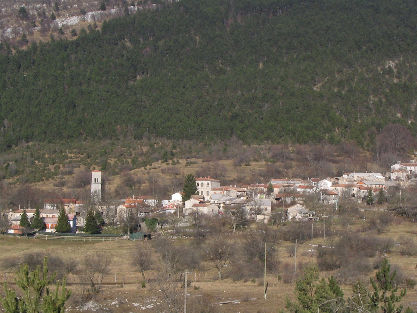 Vodice, Istria, Croatia